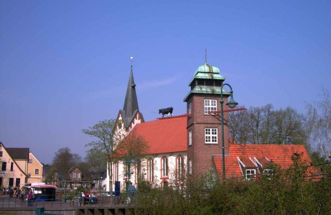 St. Willehadi Kirche und Schlauchturm in Osterholz-Scharmbeck. Photographiert im April 2005. Photograph: CWitte